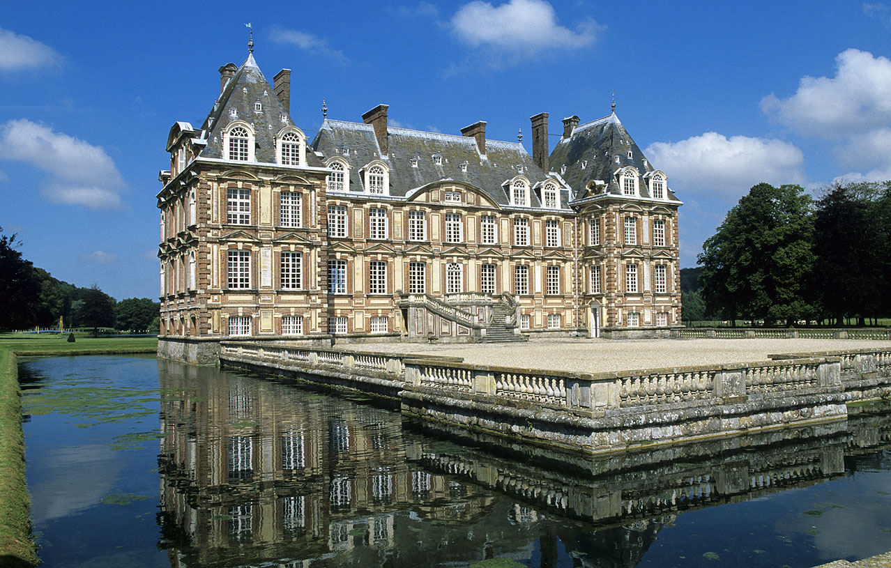 Château de Cany (InscritInscrit) .